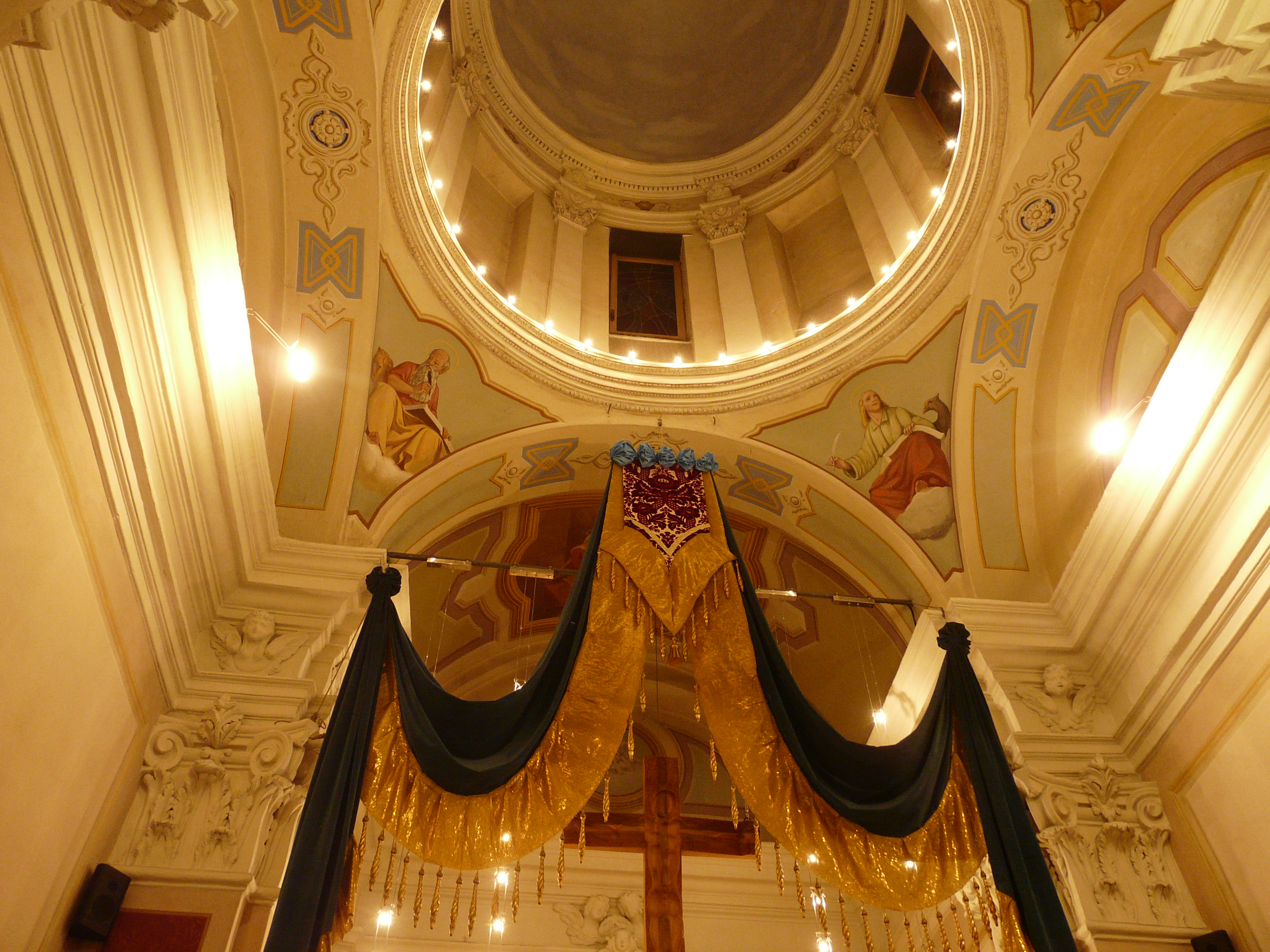 La chiesetta di Sant'Anna, illuminata in occasione delle festività patronali del 26 luglio 2012. Quartiere di Sant'Anna, Rapallo, Liguria, Italia